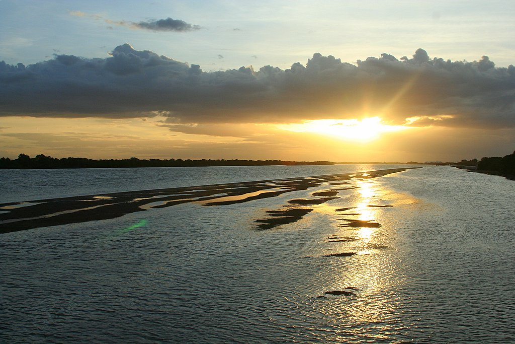 Rio Piranhas-Açu no Rio Grande do Norte, Brasil. Piranhas-Açu river in the Rio Grande do Norte, Brazil.